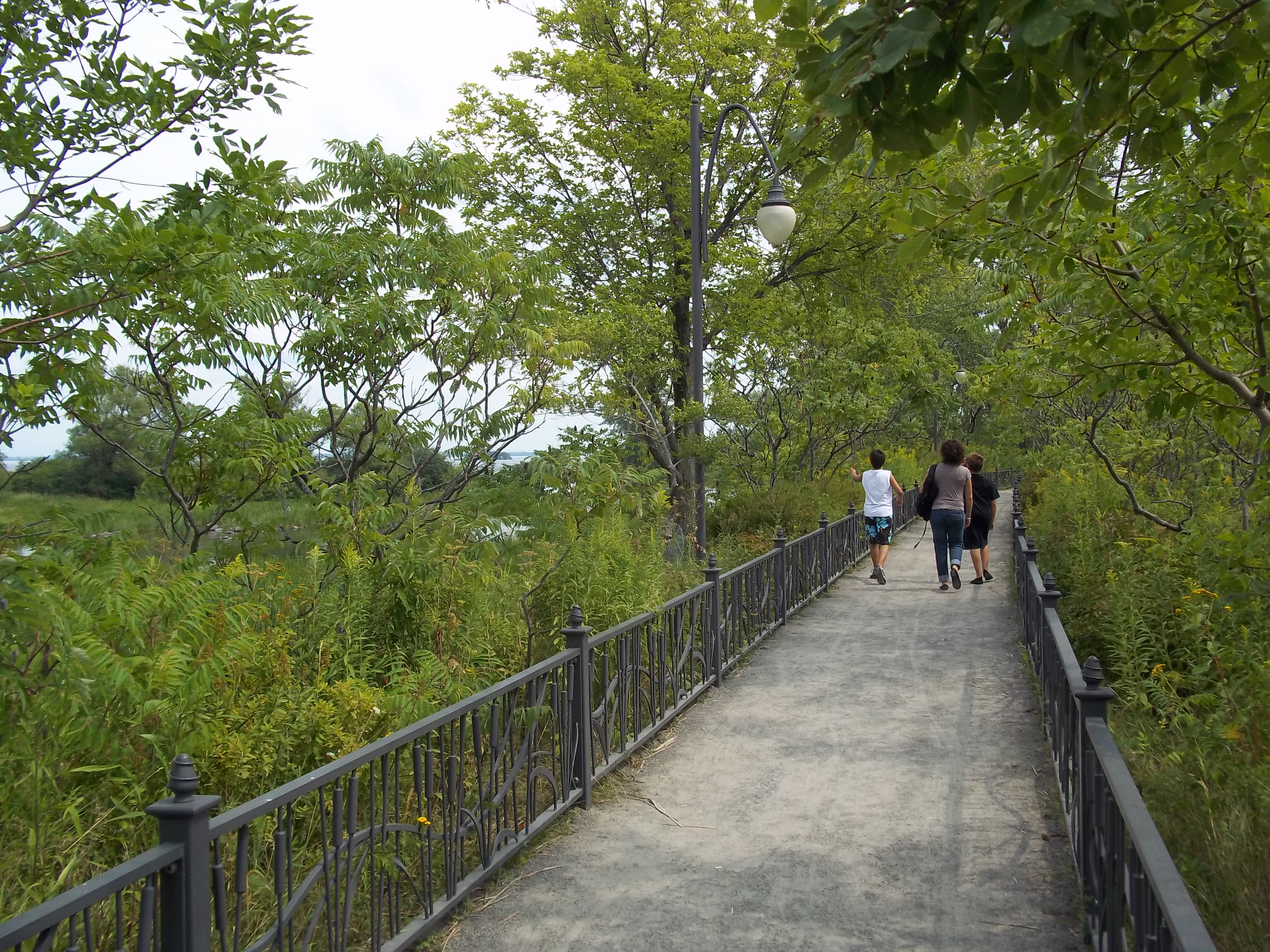 Parc des Rapides, Lachine, Montréal